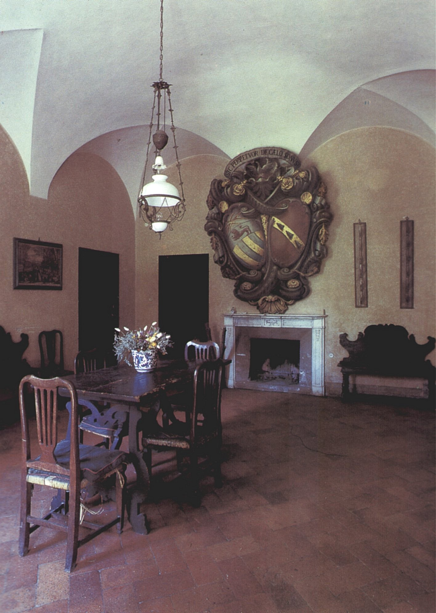 vila La Farnia ingresso